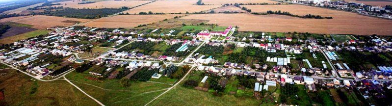 Панорамный вид на Шитхалу